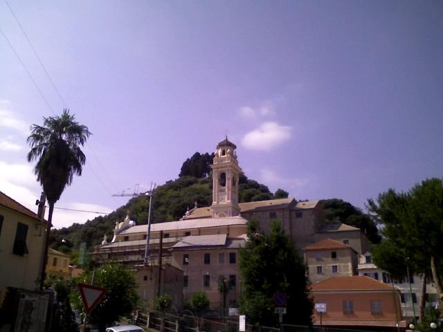 Antonello Piccone, Chiesa San Nicolo' e collina Castellaro in Albisola Superiore (Italy)